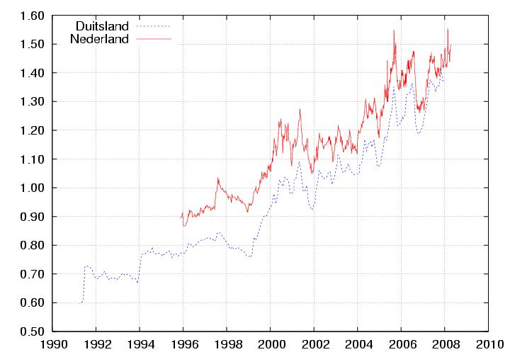 prijs van euro 95 in nederland en duitsland